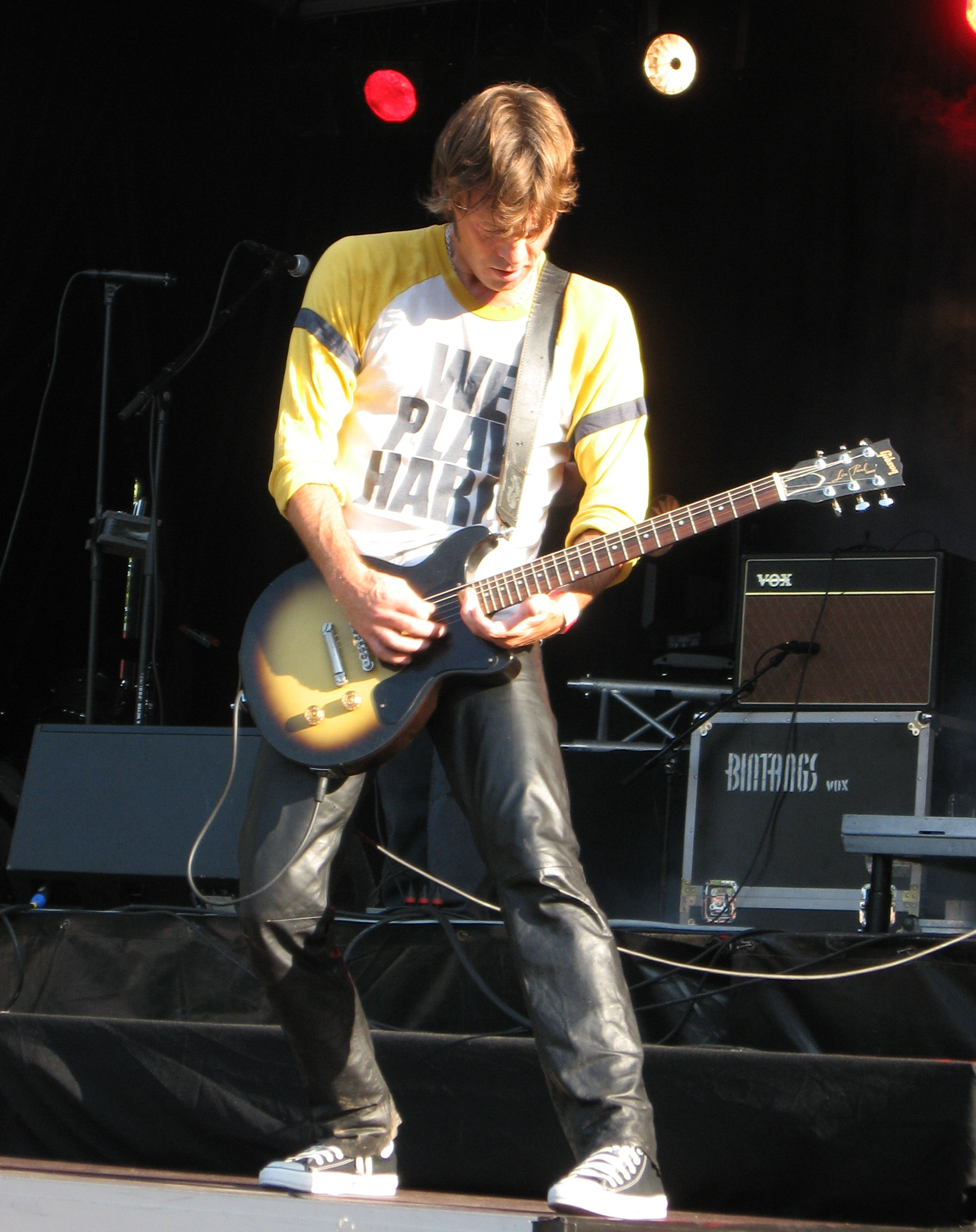 Maarten_Ibelings, Bintangs, Westerpop